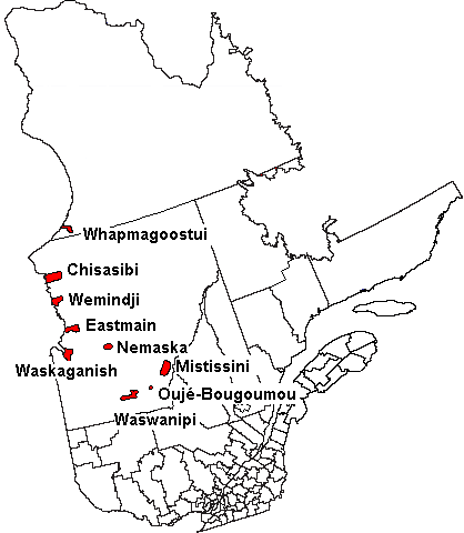 Villages cris du Québec. Modification de l'image Image:Mun-Baie-James.png